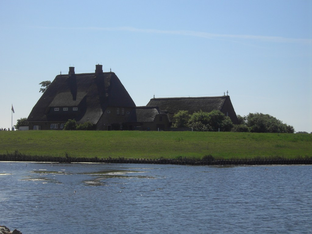 Kirchwarft, Hallig Hooge